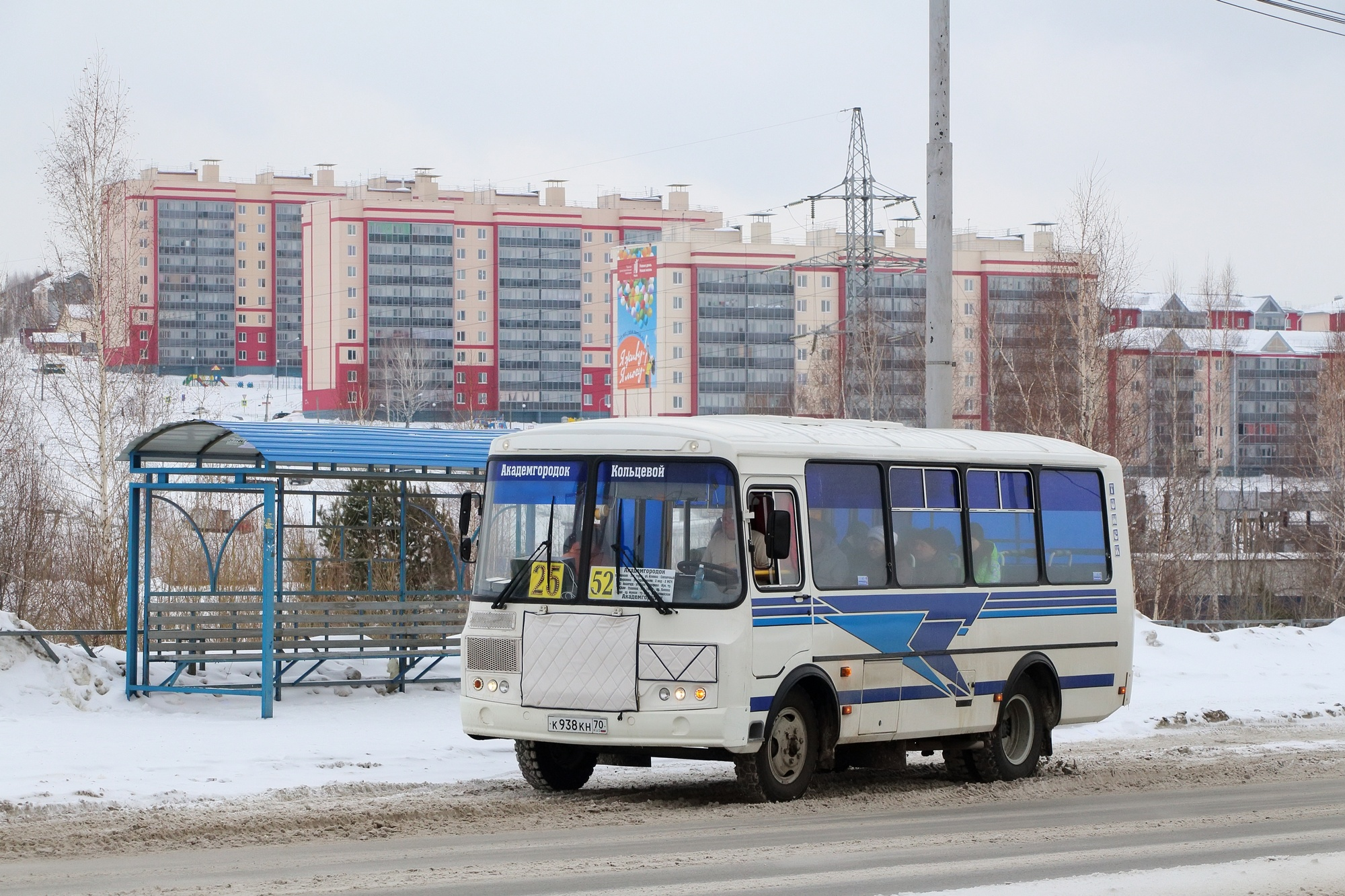 Автобус ПАЗ-32054 на маршруте 52 в Томске.